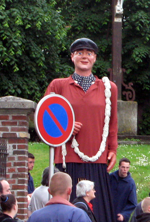 Ham (Somme, France) - Animation festive au centre-ville, un dimanche de printemps. Le géant Batisse descendant la rue du Château pour rejoindre la rue de Noyon. .